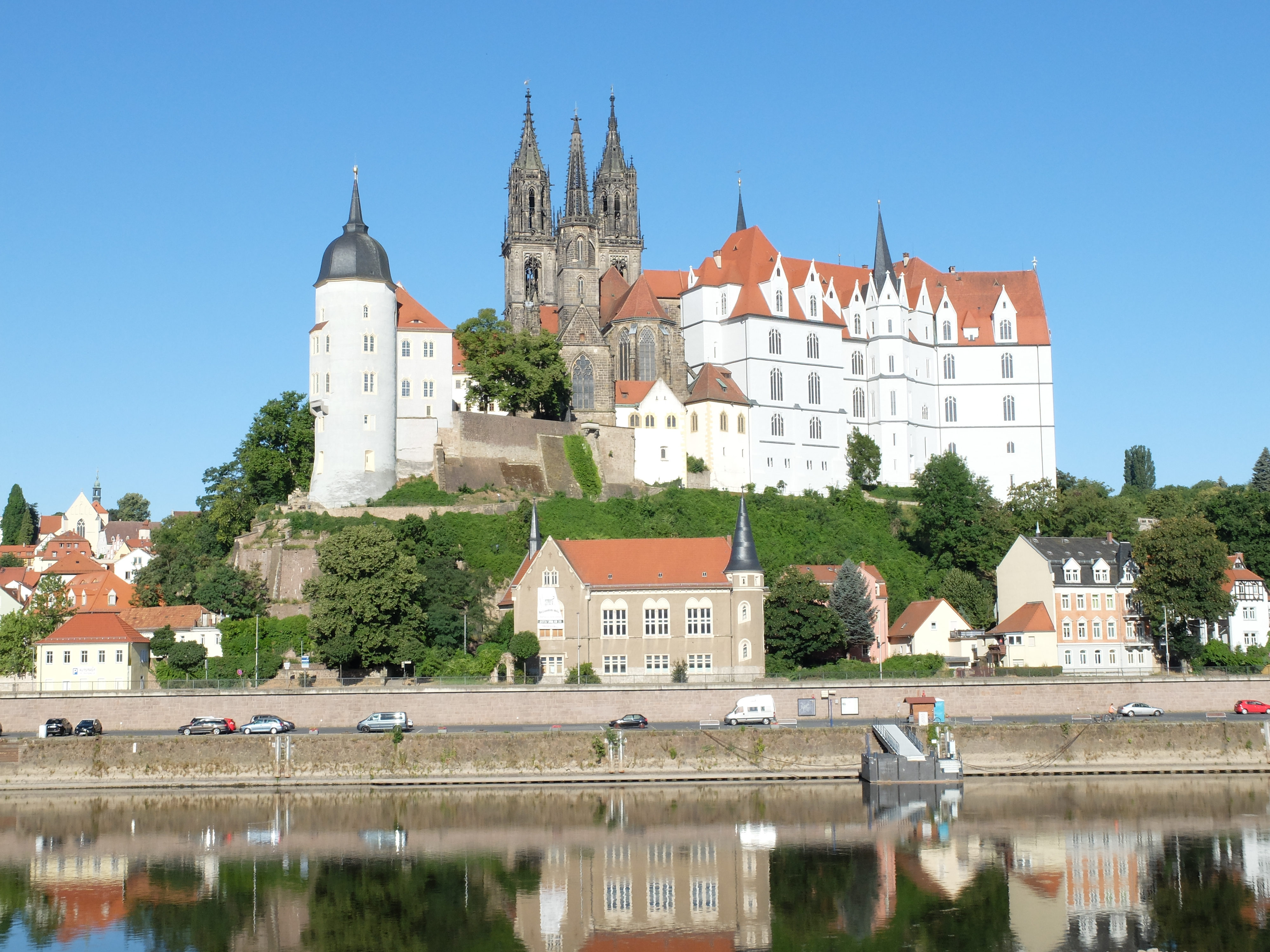 Porzellanstadt Meißen